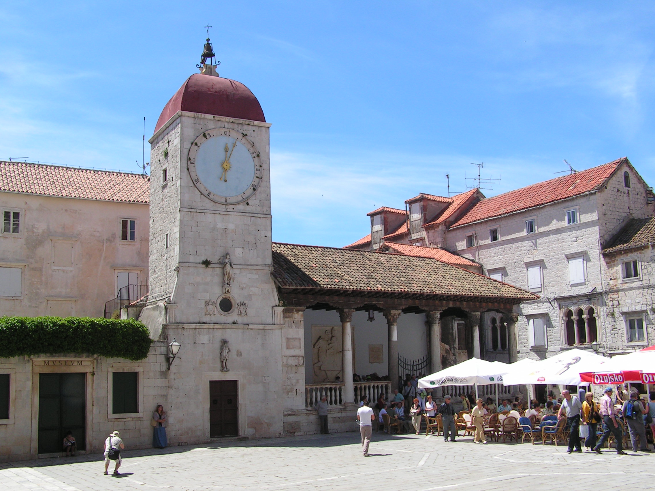 Historische stad Trogir.jpg